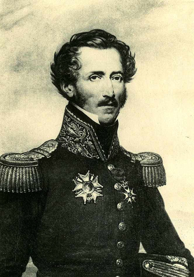 Lithographie (?) du général Théophile Voirol (1781-1853).